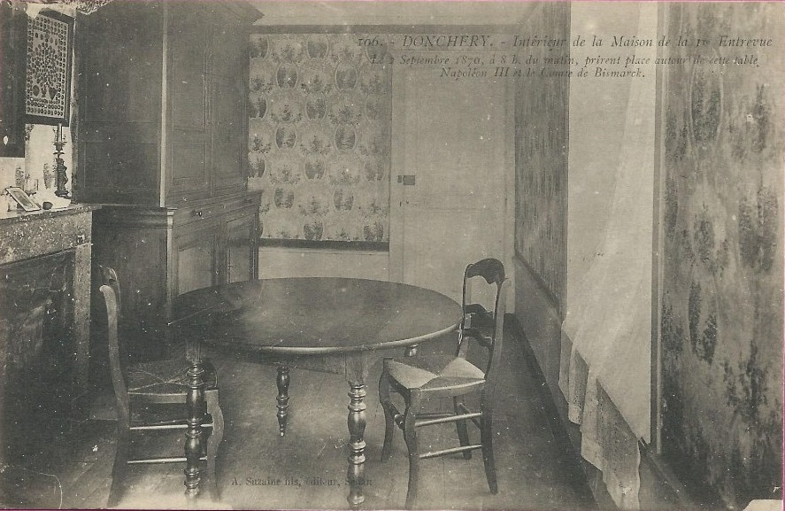 Der Raum, in dem Bismarck und Napoleon III sich aufhielten